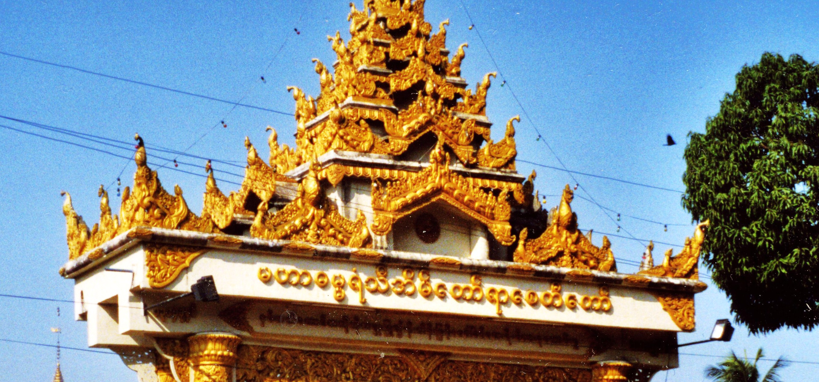 Portail d'entrée d'une pagode située Myoma Kyaung Rd. à Yangon